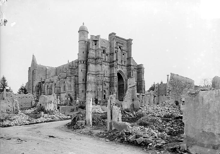 Église de Rembercourt, dommages de guerre, vers 1915, vue d'ensemble nord-ouest, par Henri Heuzé.